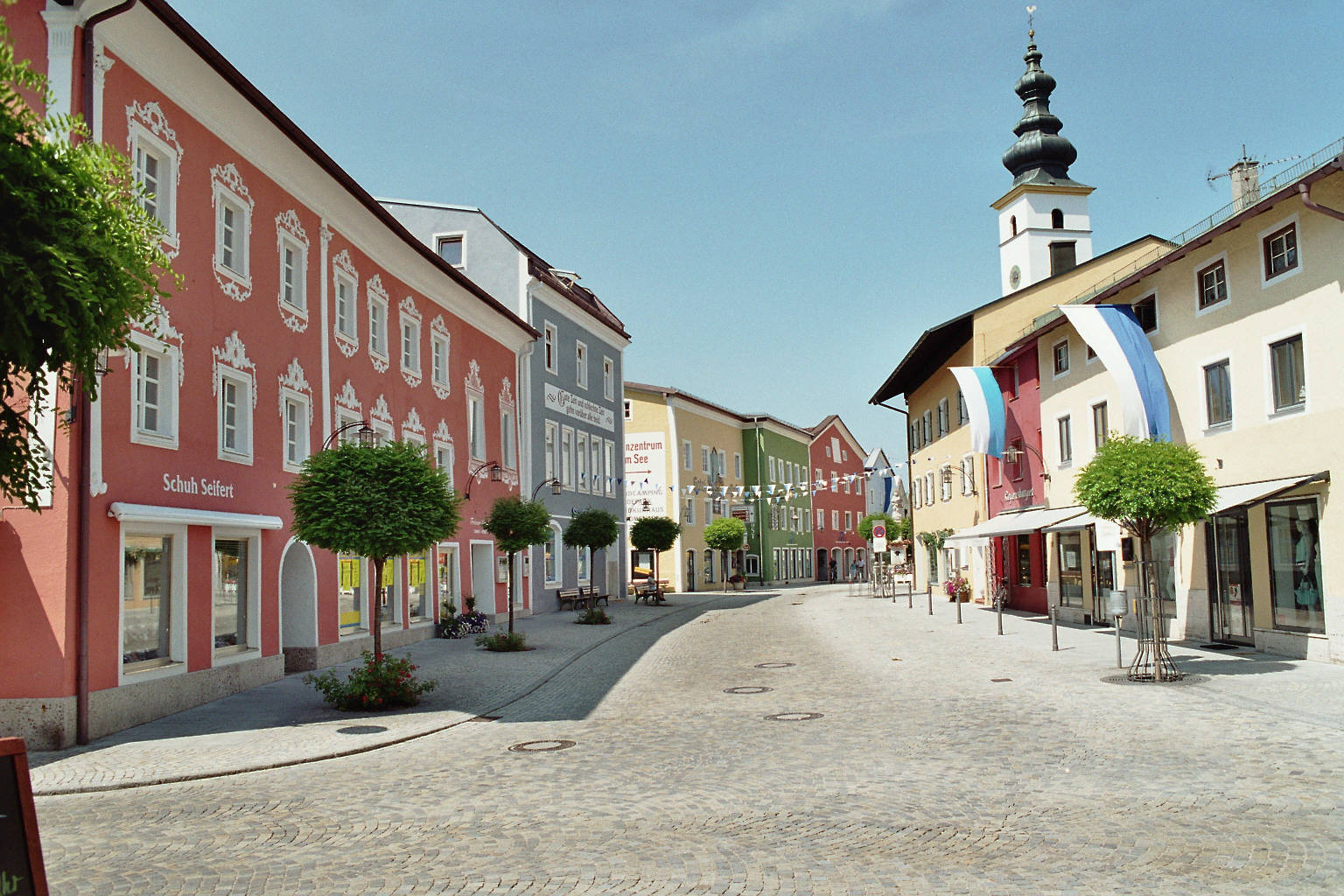 Waging am See, Blick zum Marktplatz